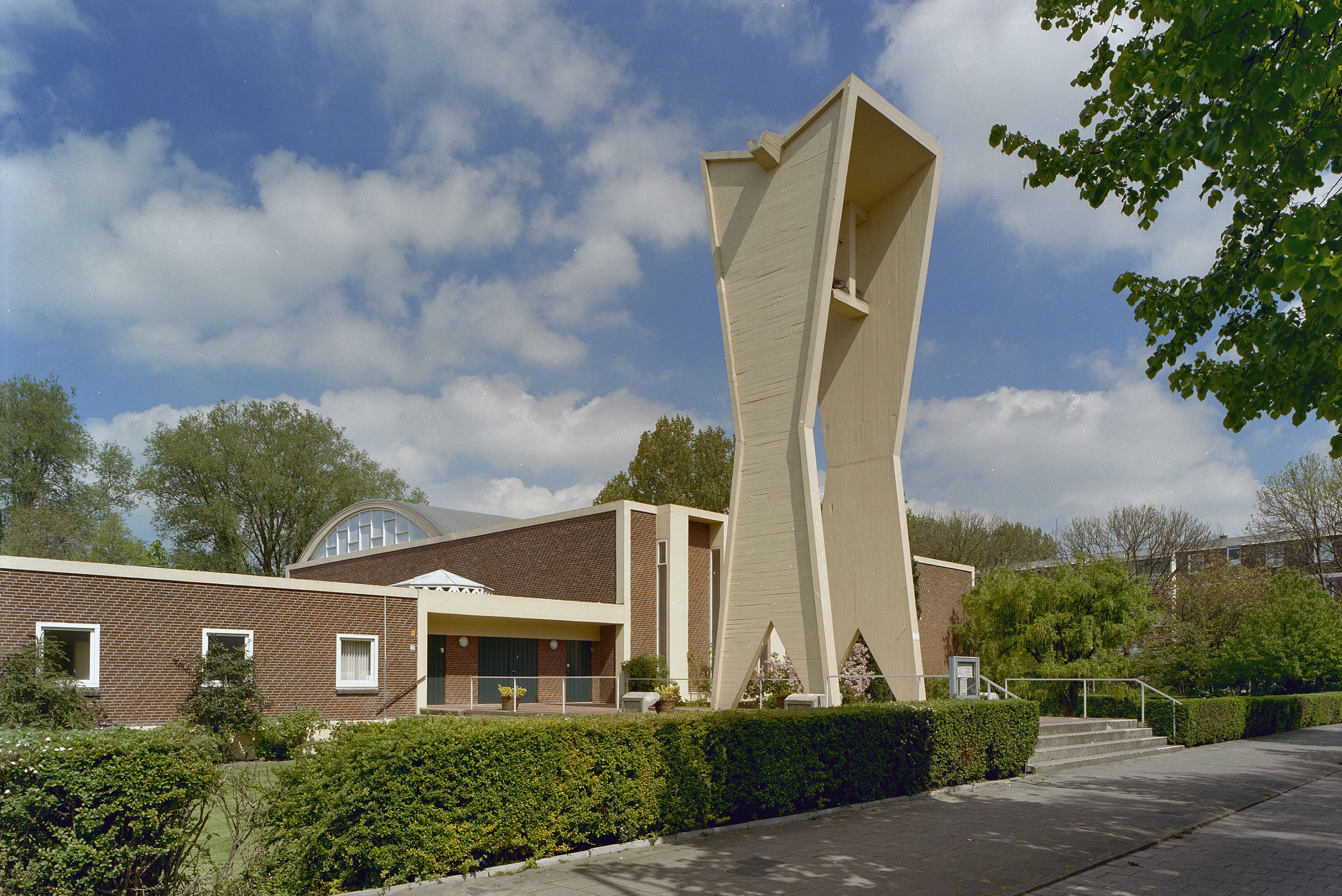 Hervormde Adventkerk, thans Christelijke gemeente Gods: Overzicht noordwestgevel met vrijstaande klokkentoren (opmerking: Gefotografeerd voor Monumenten van Herrezen Nederland)